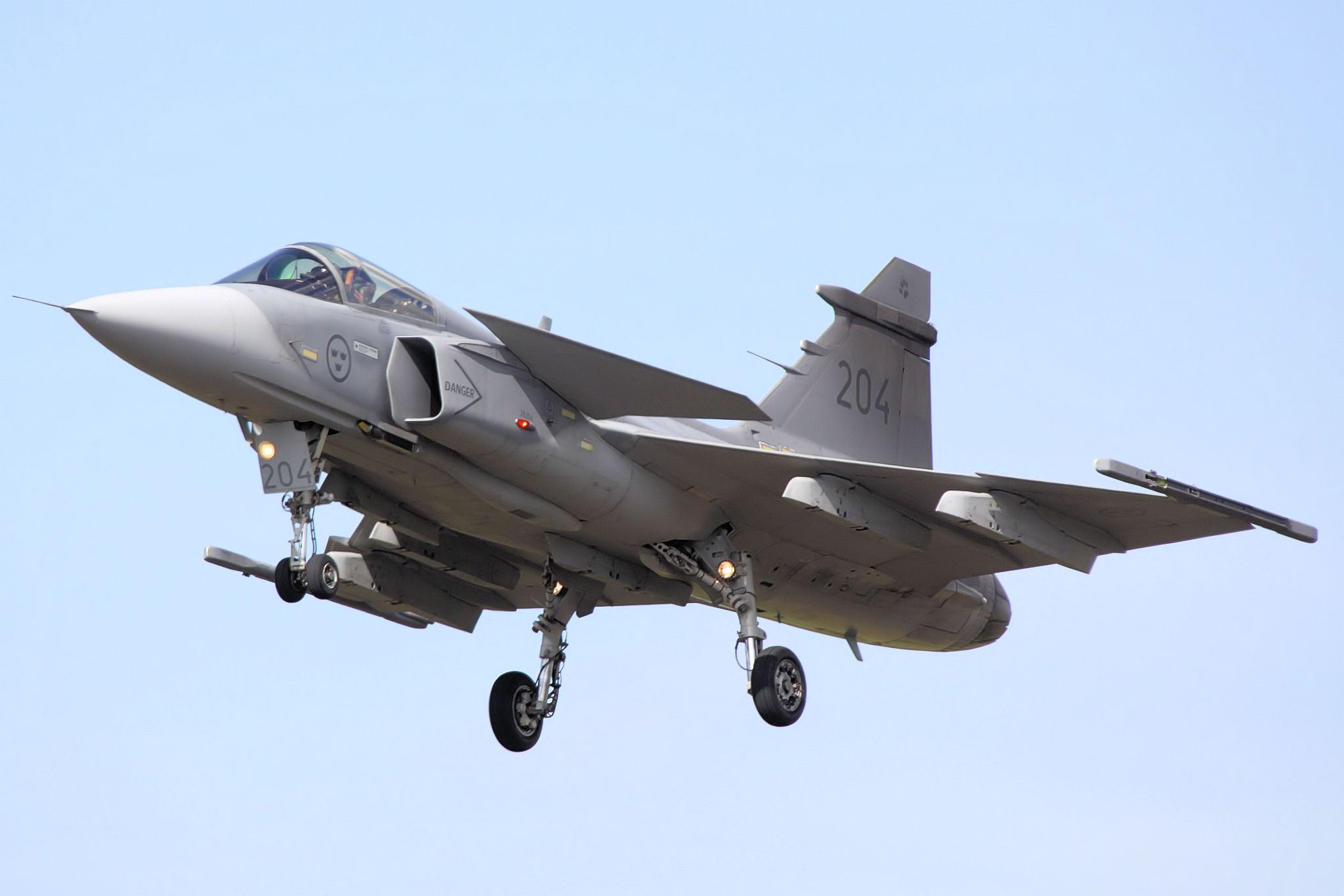 Gripen - RIAT 2009